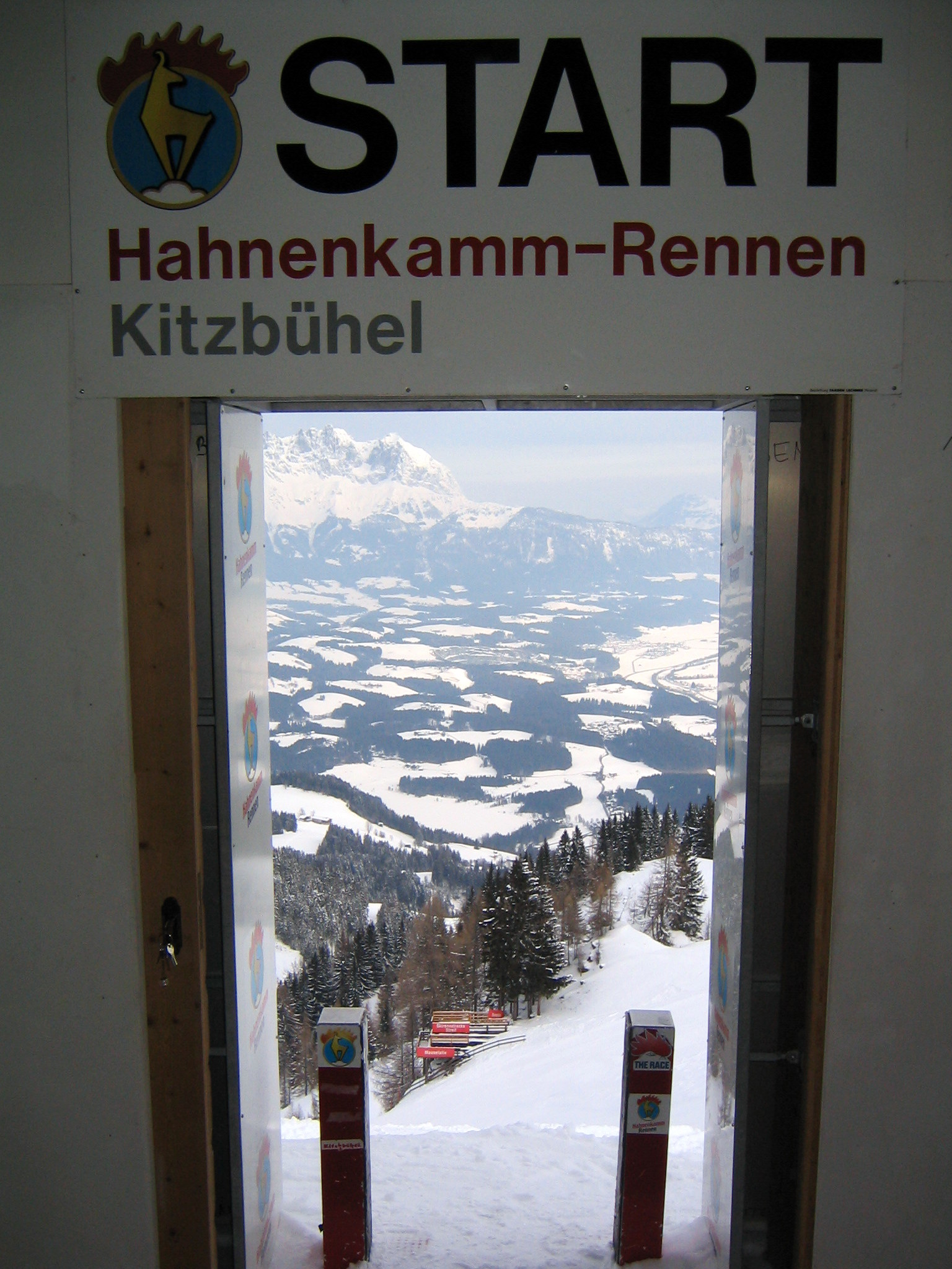 Blick aus dem Starthaus der Hahnenkamm-Abfahrt